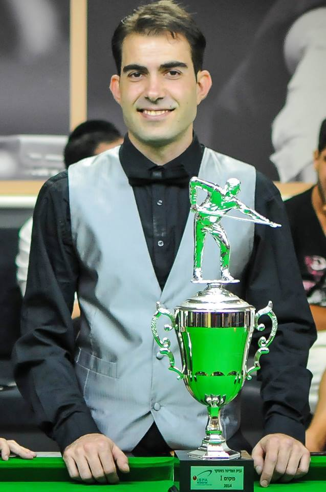 גביע המדינה 2014